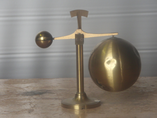 Photographie d'un baroscope